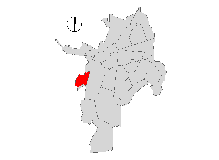 Comuna 20 de Santiago de Cali, Colombia.